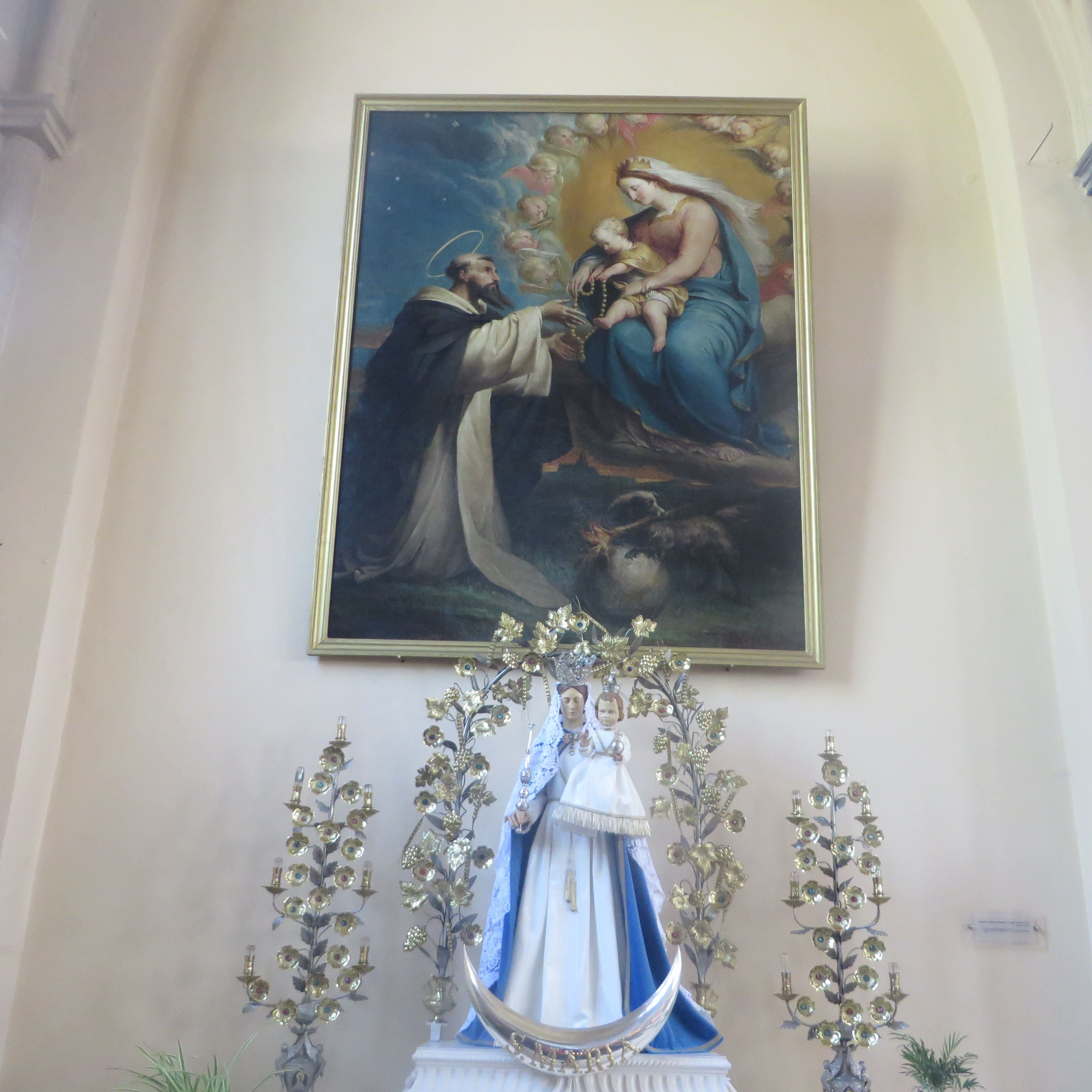 Dominicus ontvangt rozenkrans uit handen van O.L. Vrouw. Schilder Henri Dobbelaere